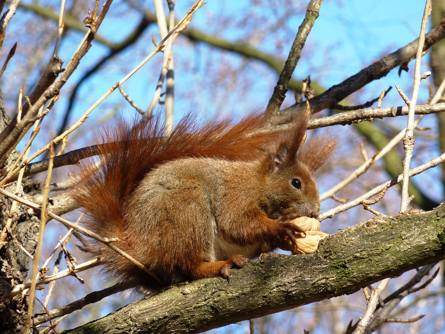 Wiewiórka pospolita, Park Łazienkowski, marzec 2012